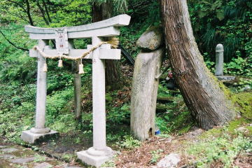 Yama-no-Kami (山の神, 新潟県見附市)